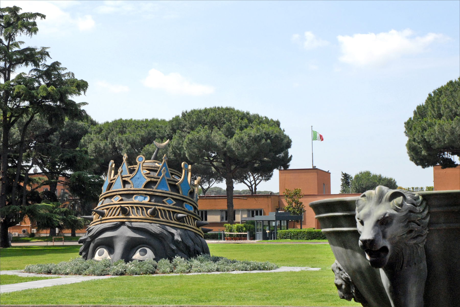 Sur la pelouse d'entrée des studios Cinecittà, des éléments de décor du film Casanova de Federico Fellini __________ A l'occasion du 150e anniversaire de l'unification de l'Italie, les Studios Cinecittà sont ouverts au public dans le cadre d'une exposition intitulée "Cinecittà si Mostra". A l'entrée, le petit pavillon Cinears rend hommage à la famille De Angelis, spécialisée dans la reproduction de sculptures. Dans le bâtiment face à l'entrée des studios, une exposition décrit la manière de réaliser un film : costumes, accessoires, dessins, décors, scénarios, photographies, montage, post-production. Dans un autre bâtiment (Fellini building), une exposition est consacrée à l'histoire de Cinecittà, à des portraits d'acteurs, à l'oeuvre de Fellini, à la formation des comédiens, aux débuts d'actrices et d'acteurs italiens célèbres. Un espace particulier est destiné aux enfants. L'exposition permet également de visiter des plateaux de tournage avec décors en situation : une rue de Brodway au 19ème siècle (film Les Gangs de New York par Martin Scorsese), un forum de la Rome antique à l'époque de César avec ses temples, basiliques, thermes et un quartier d'habitation (pour une série télévisée anglo-américaine,..).